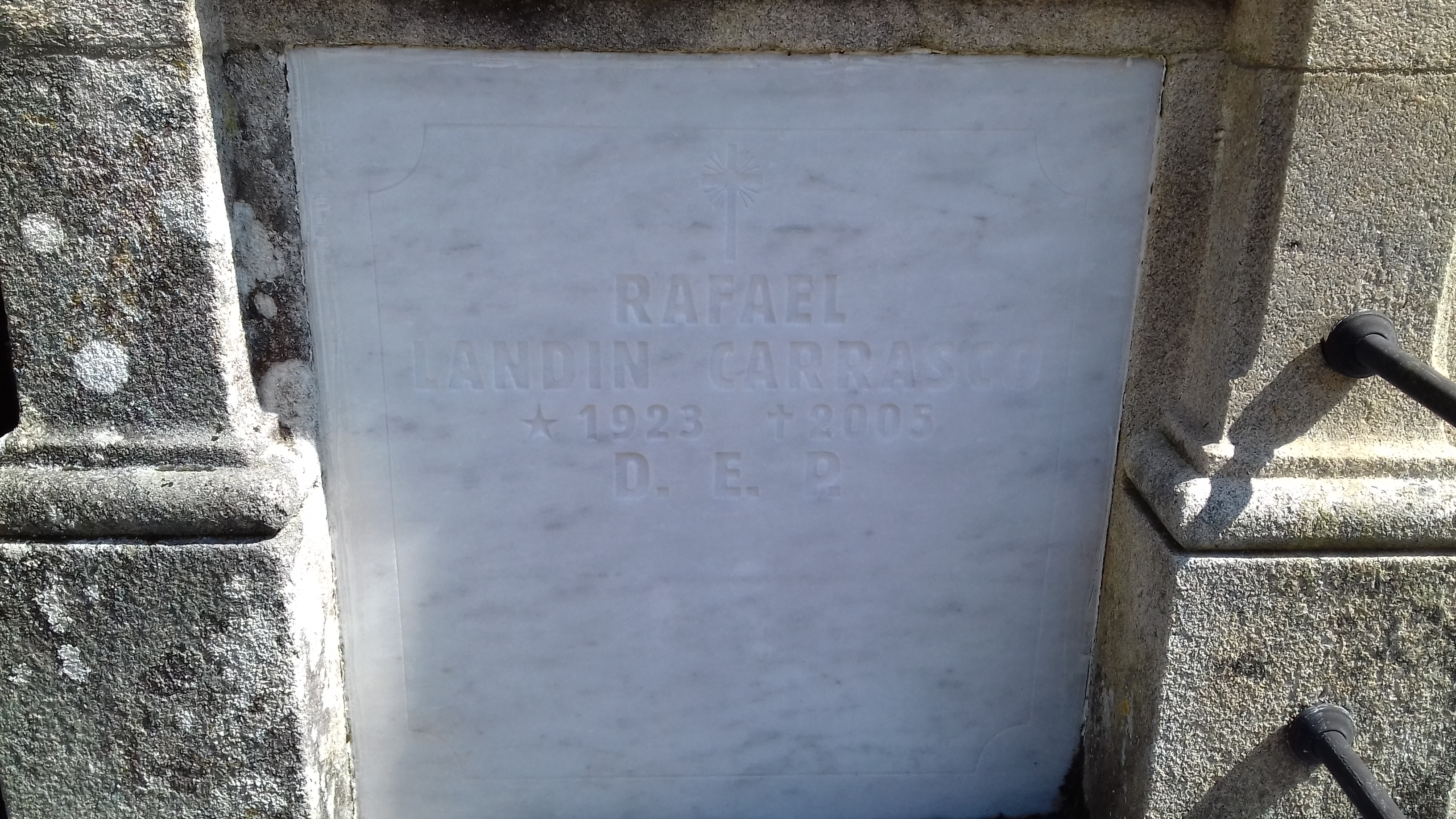 Lápida de Rafael Landín Carrasco